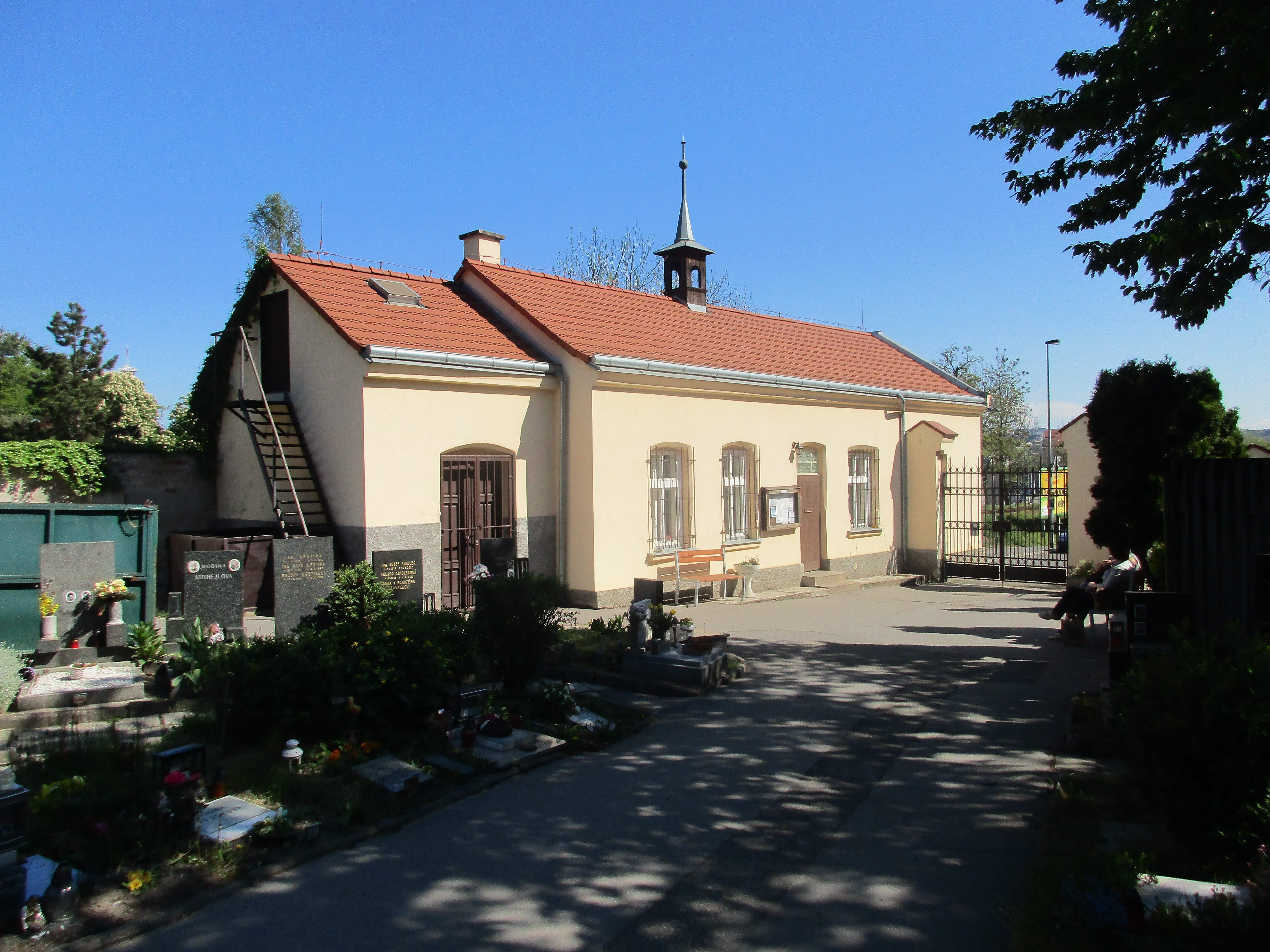 Hřbitov Holešovice.